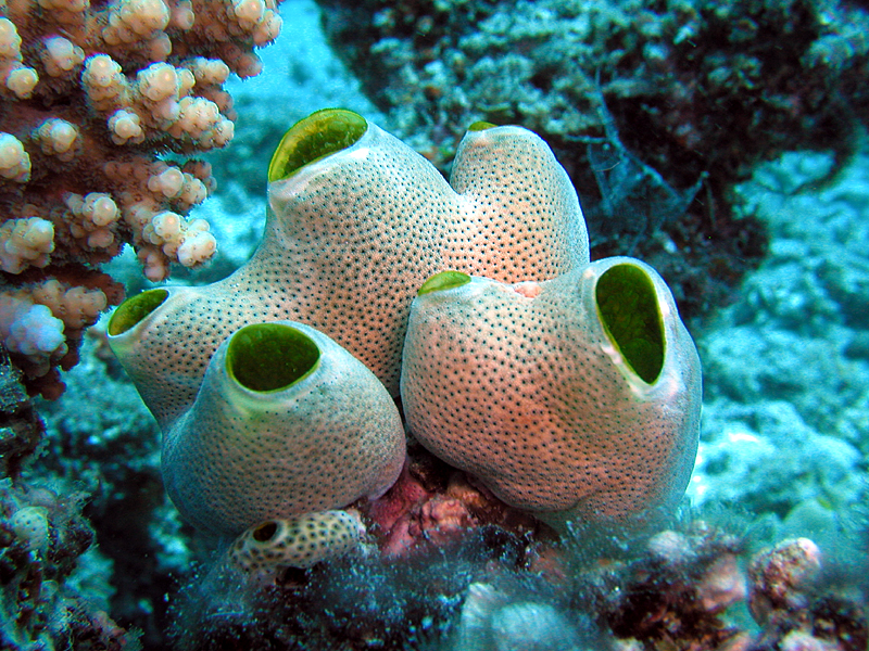 Didemnum molle en isla Lizard, Australia